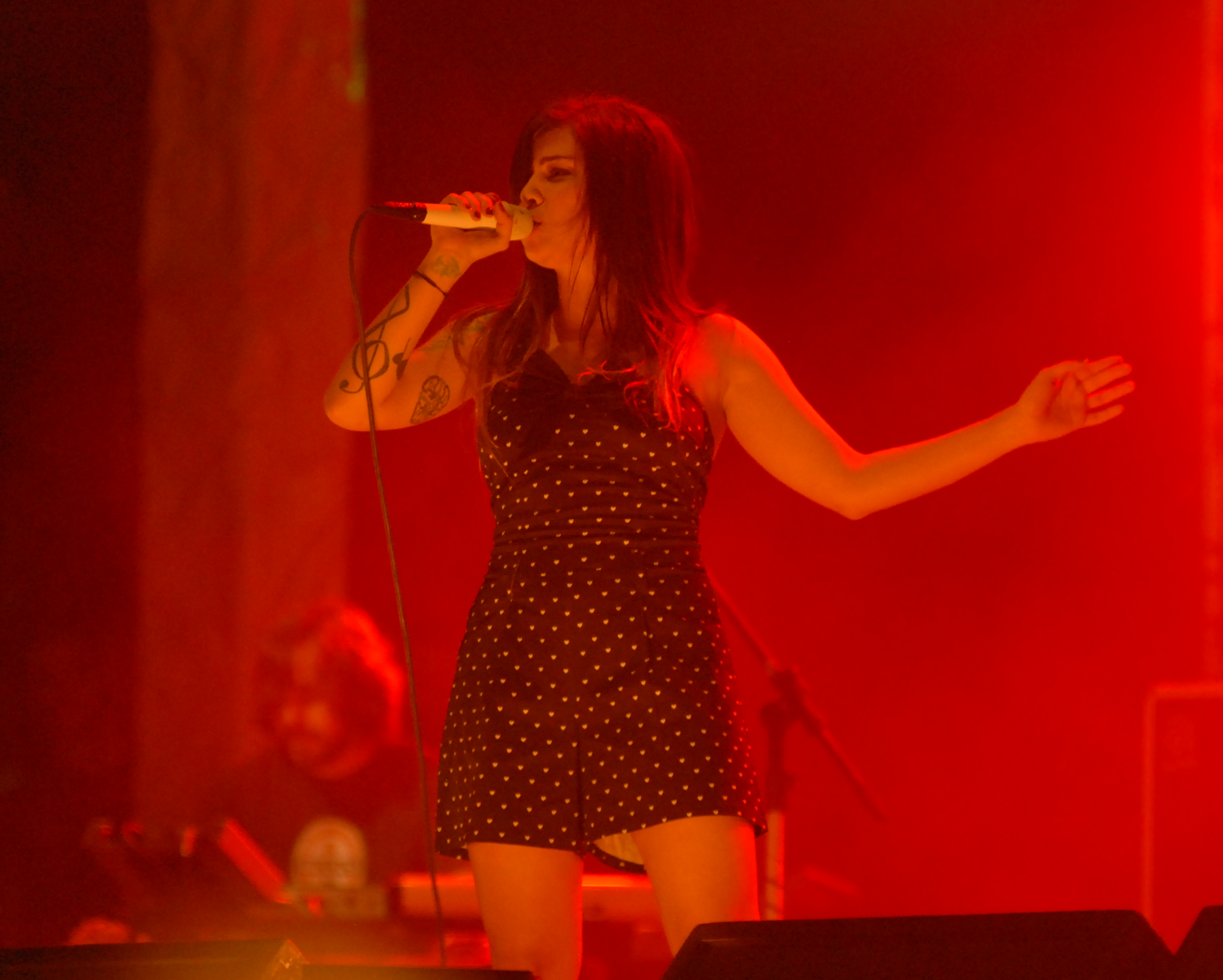 Cantora Pitty se apresenta no projeto Verão Sergipe 2011.